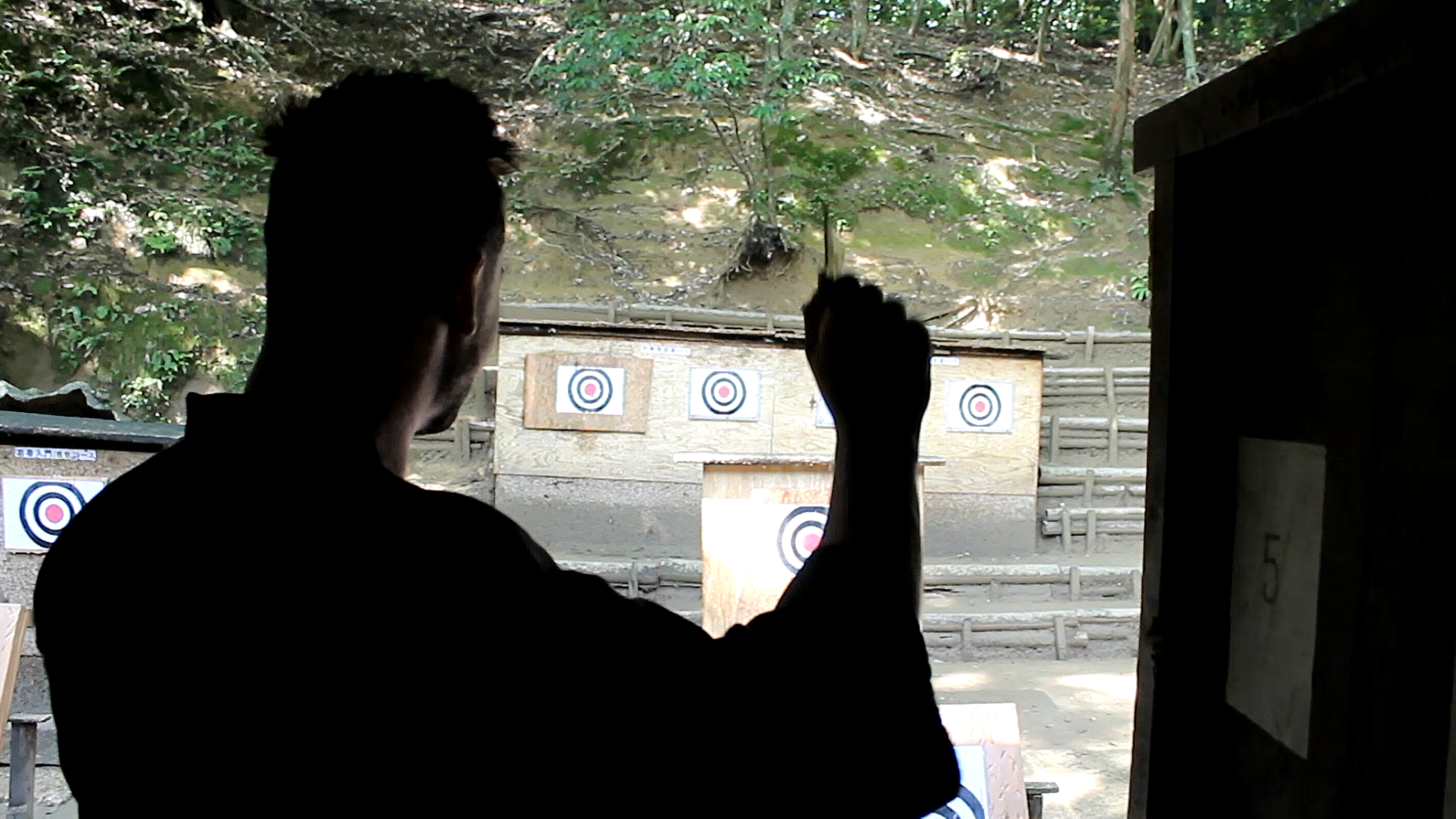 Un homme face à une cible, s'apprêtant à lancer son shuriken